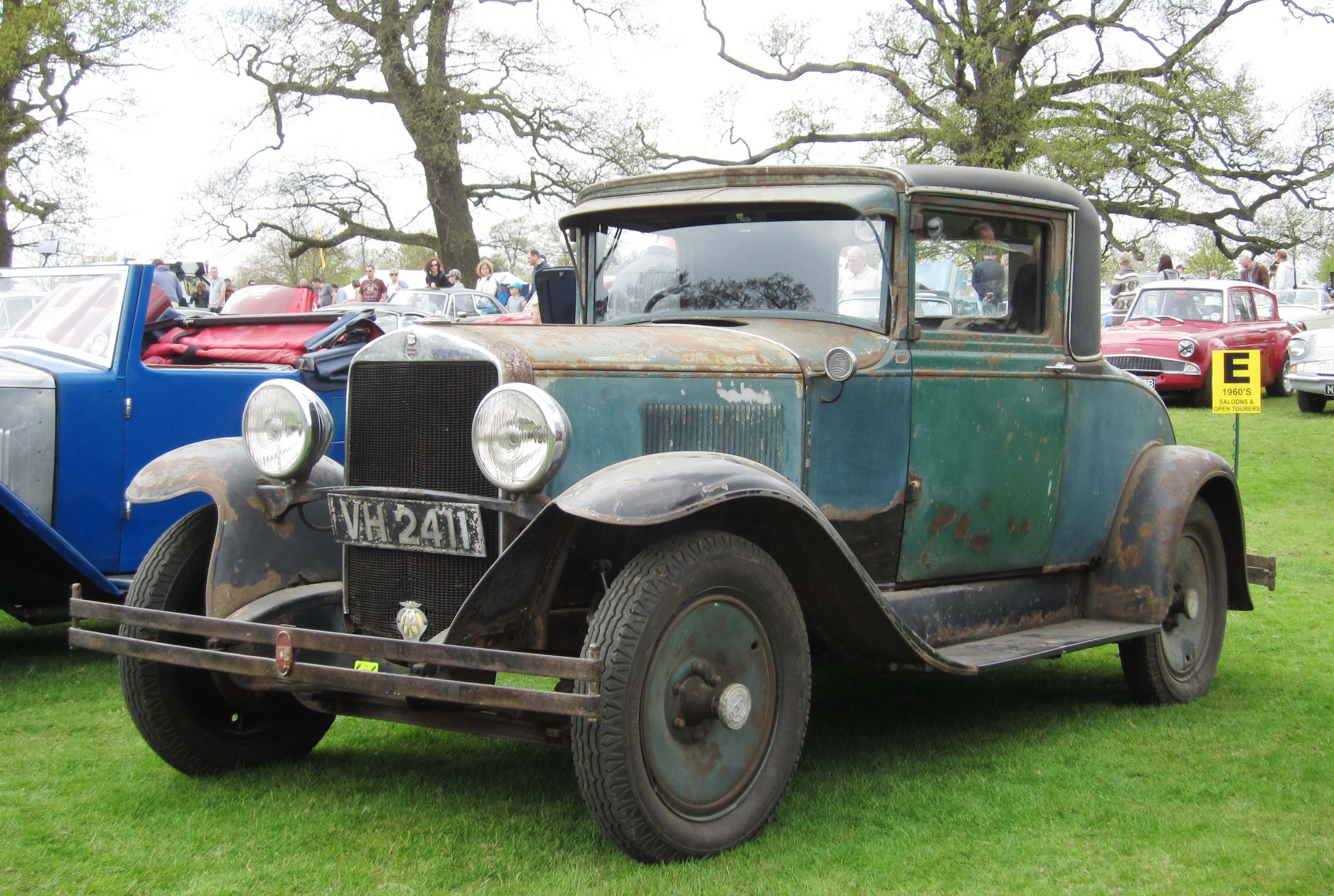 Graham Paige drophead coupe requires attention